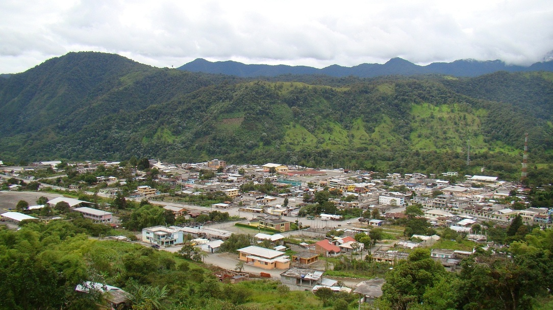 Ciudad el chaco